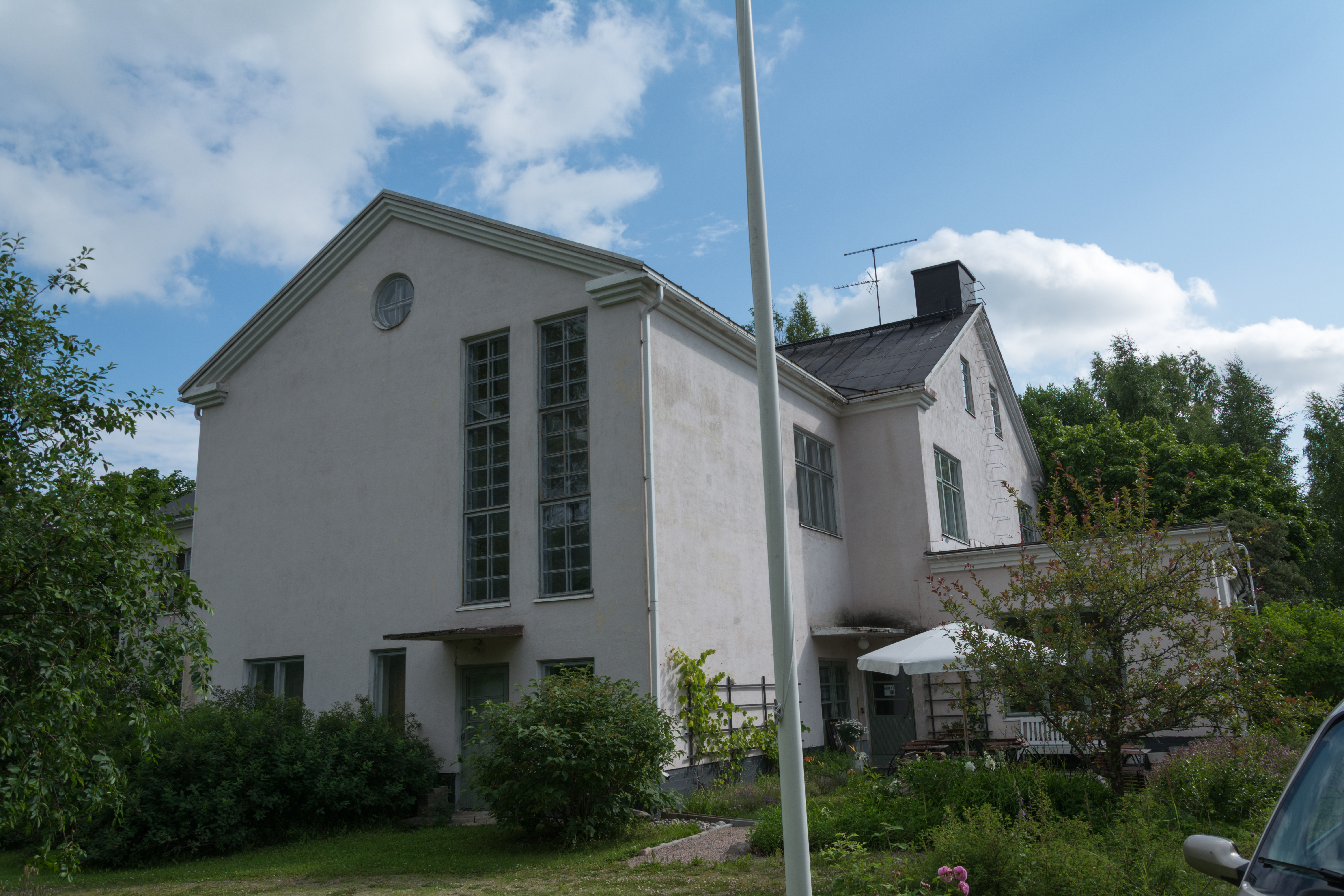 Villa Roosa, Orimattila